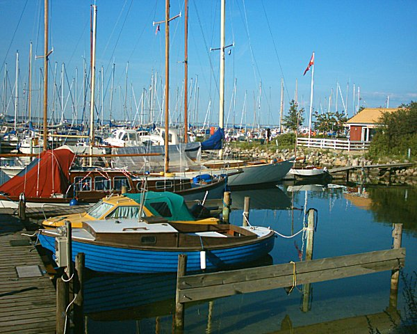 Nivå Havn (Nivå Harbour), Nivå on 30/07/04.